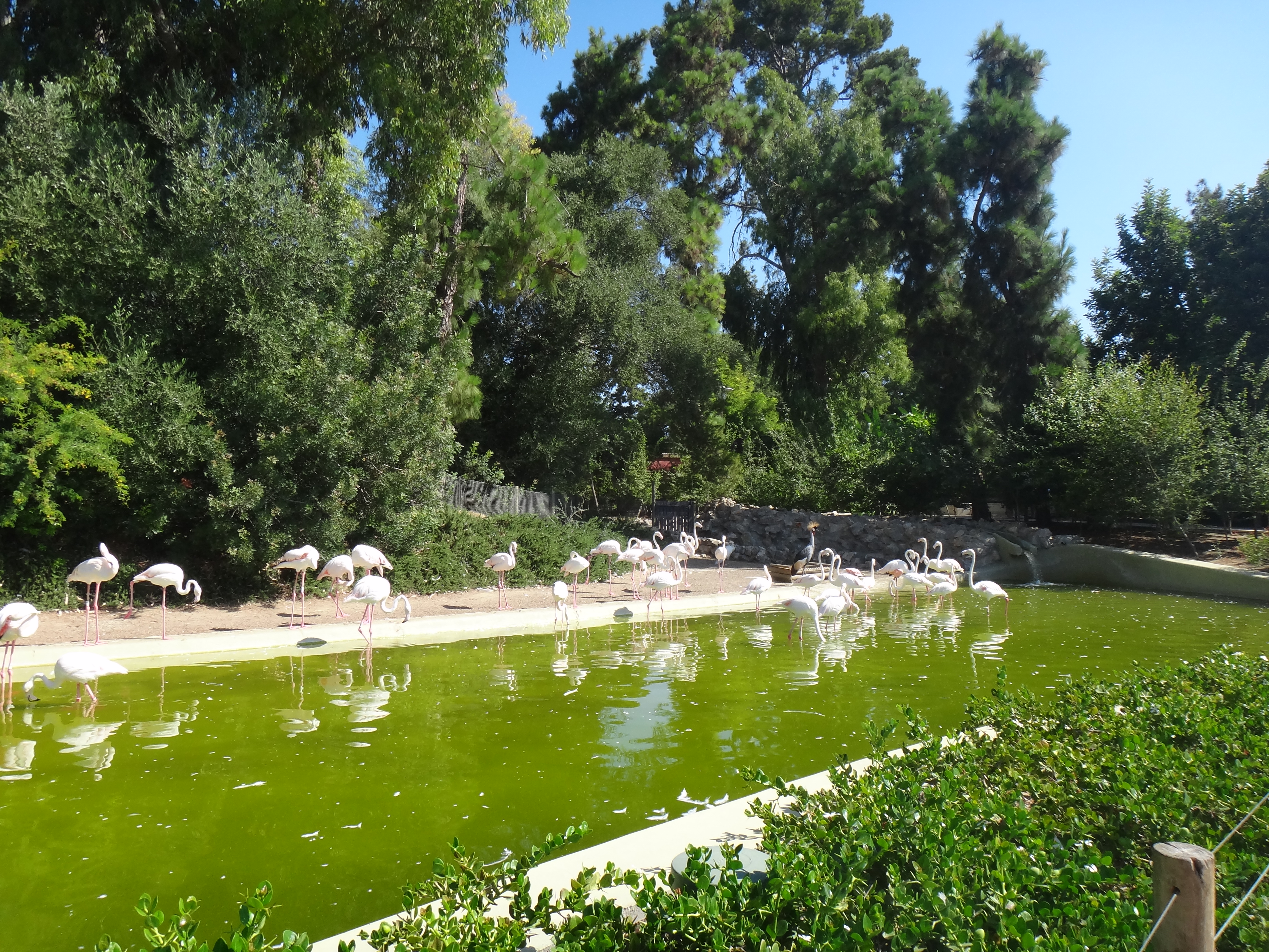 Zoológico de Jerez de la Frontera (Andalucía, España). Flamegos